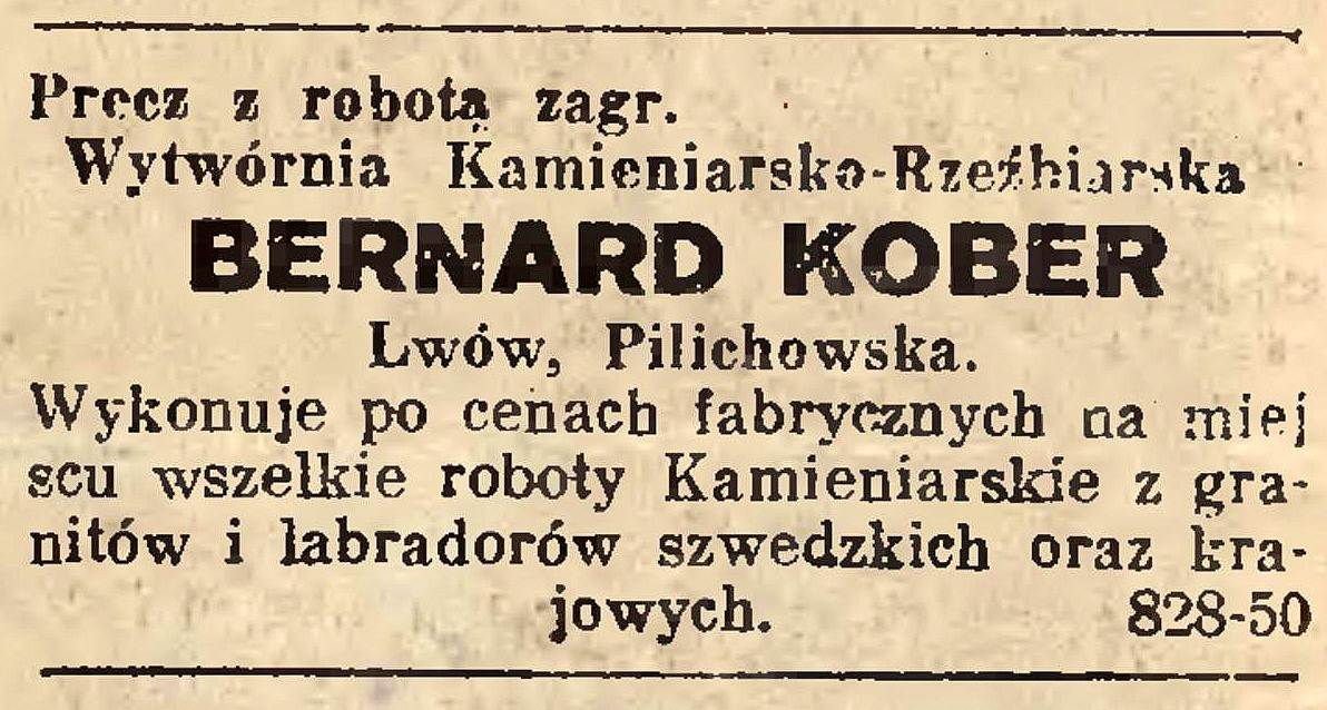 Ogłoszenie Bernarda Kobera w Gazecie Porannej z 1930